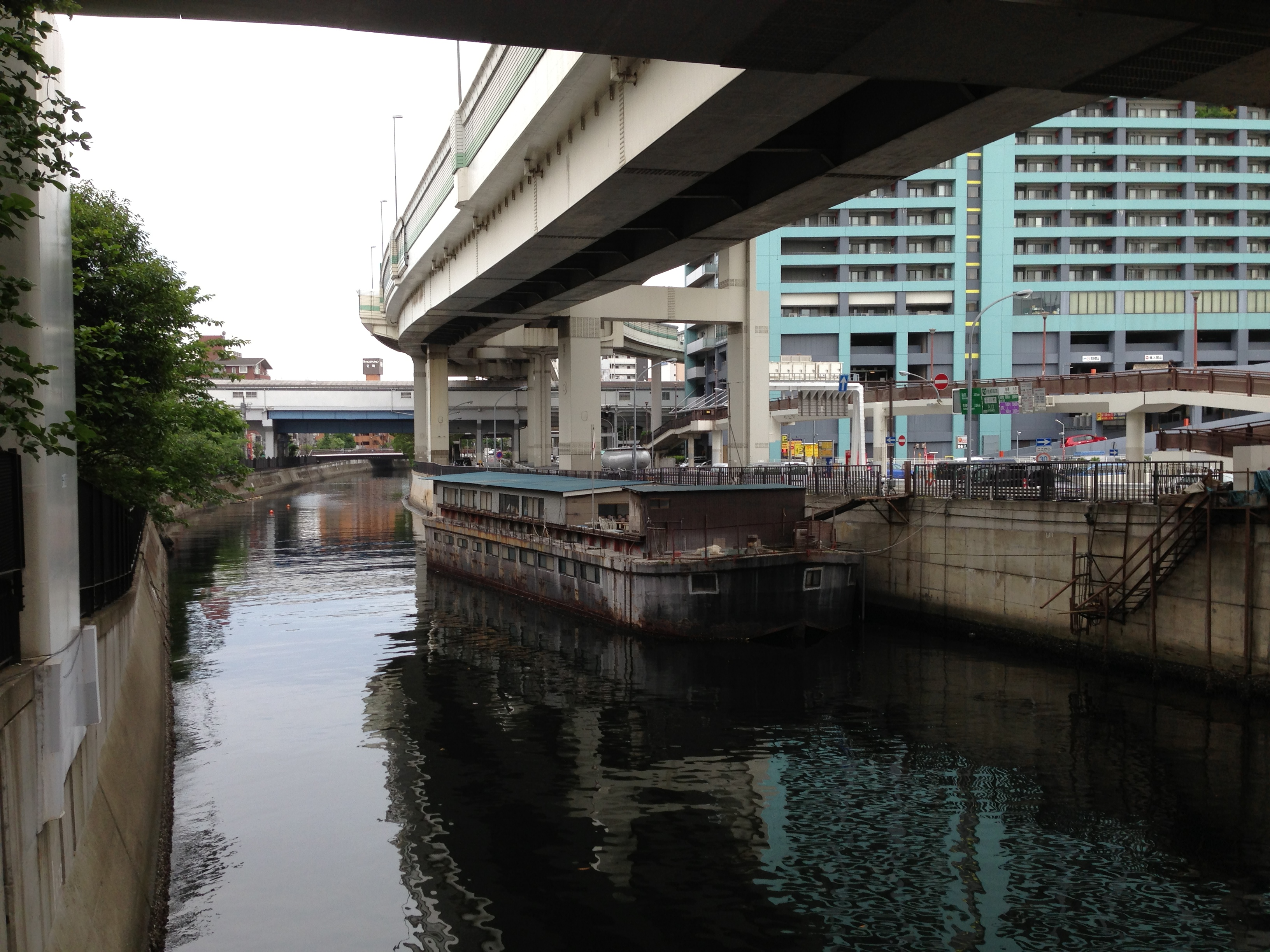 神奈川県横浜市中区元町